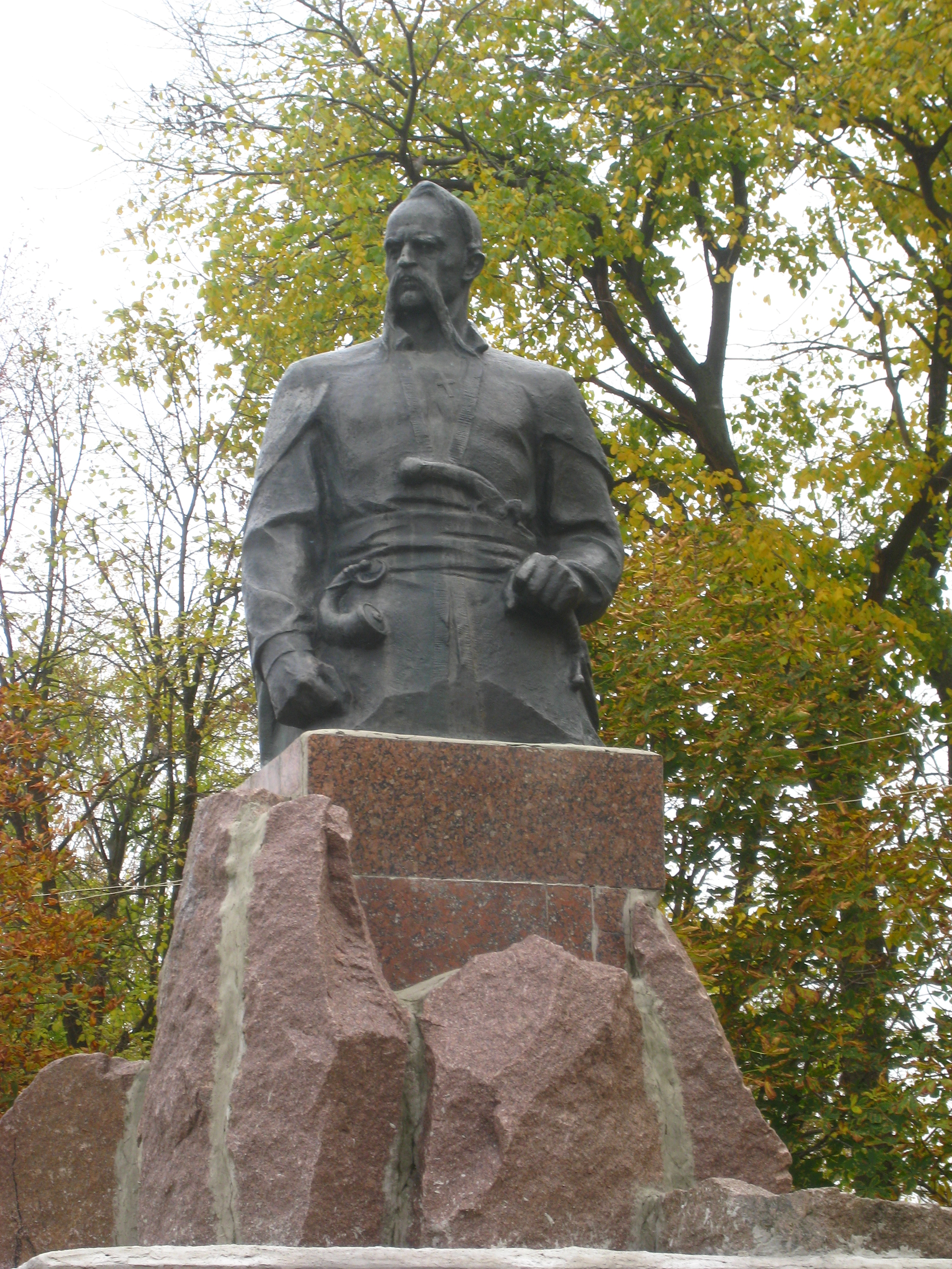 Пам'ятник козаку Івану Барвінку., Барвінкове, центр